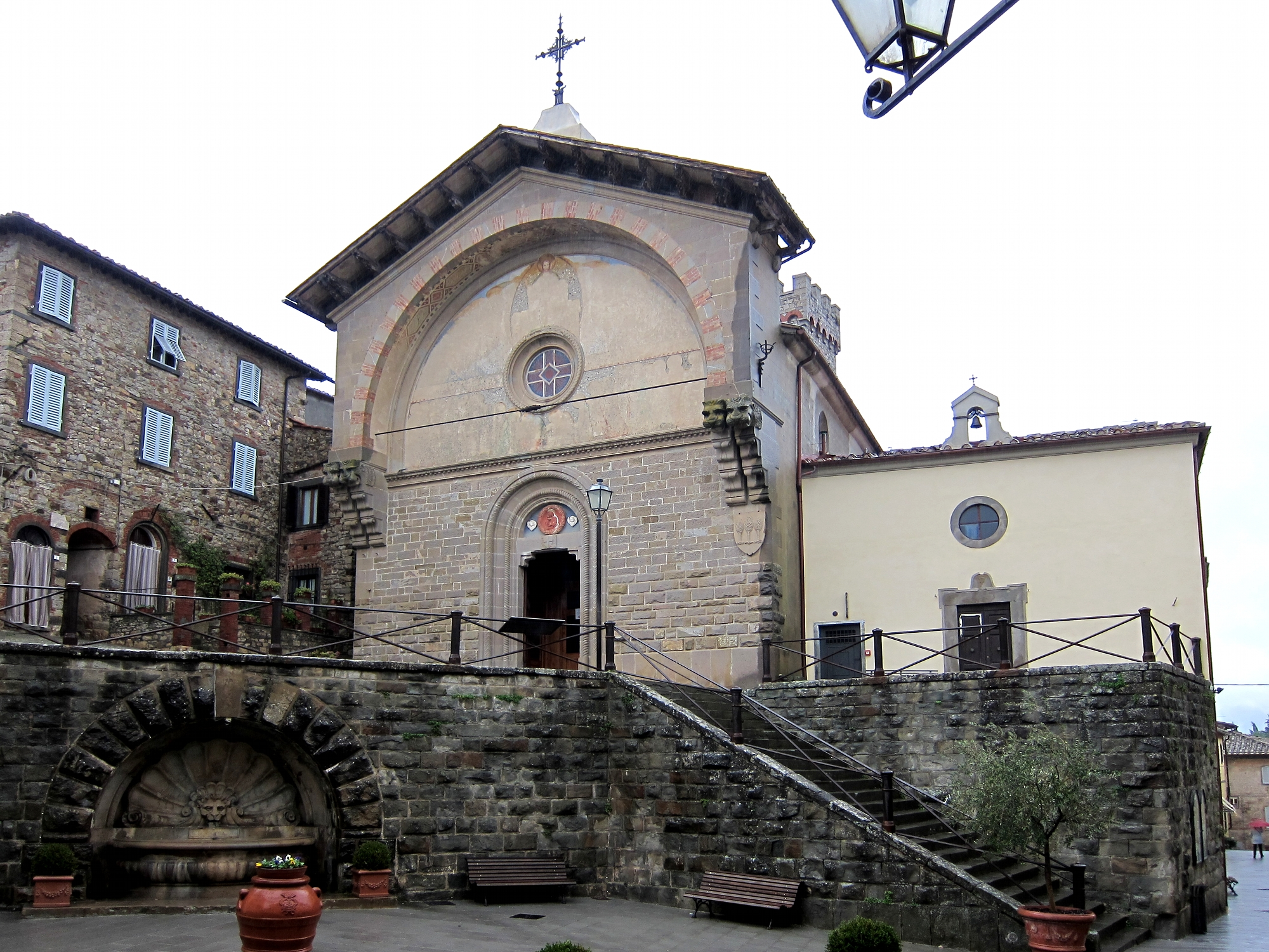 L'église Propositura Di San Niccolò de Radda in Chianti.